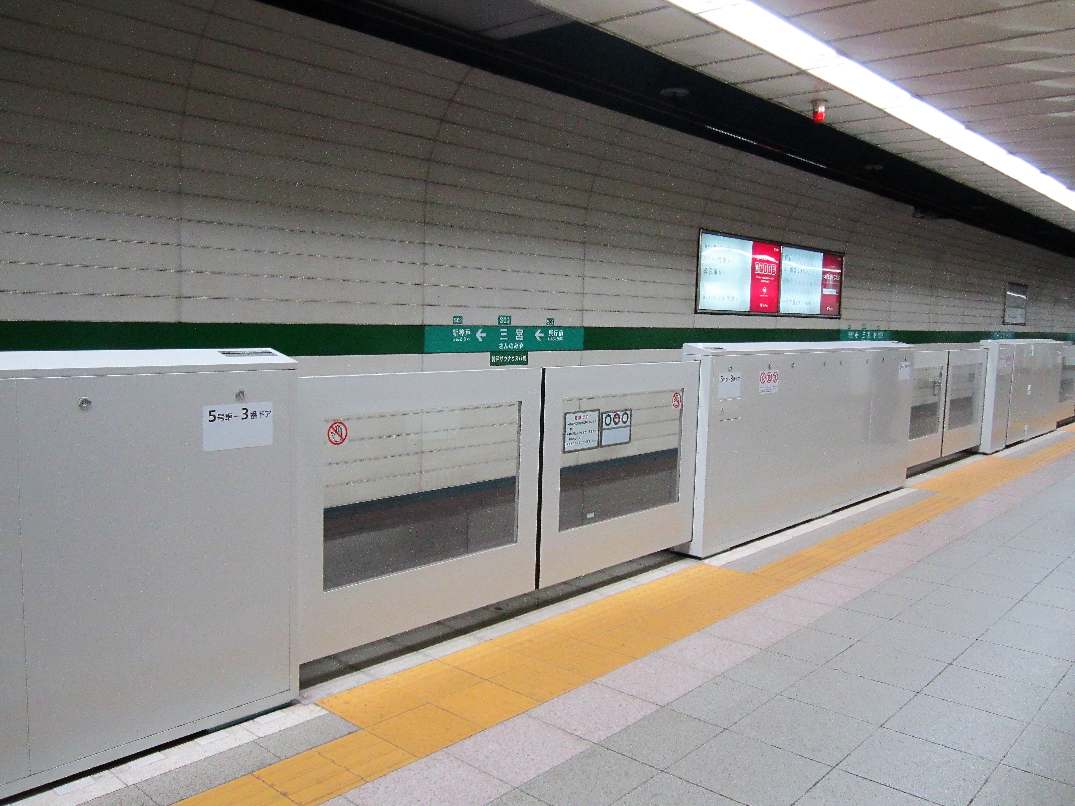 神戸市営地下鉄 三宮駅 1番線ホームに設置された可動式ホーム柵 Canon PowerShot A2200